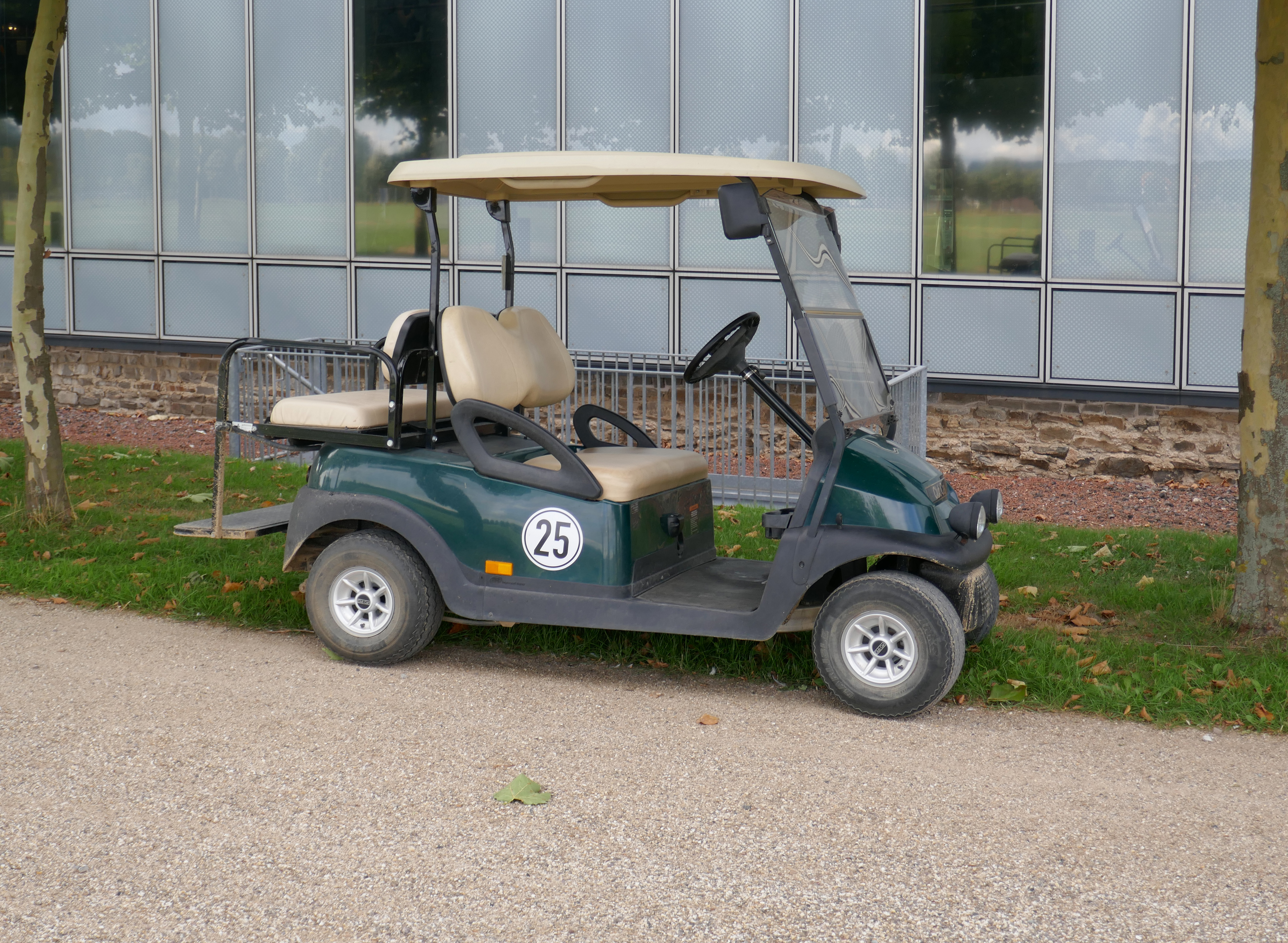 GLAM on Tour/Wikipedia trifft...die Colonia Ulpia Traiana im LVR-Archäologischen Park Xanten - Die LVR Club Car-Limousine.